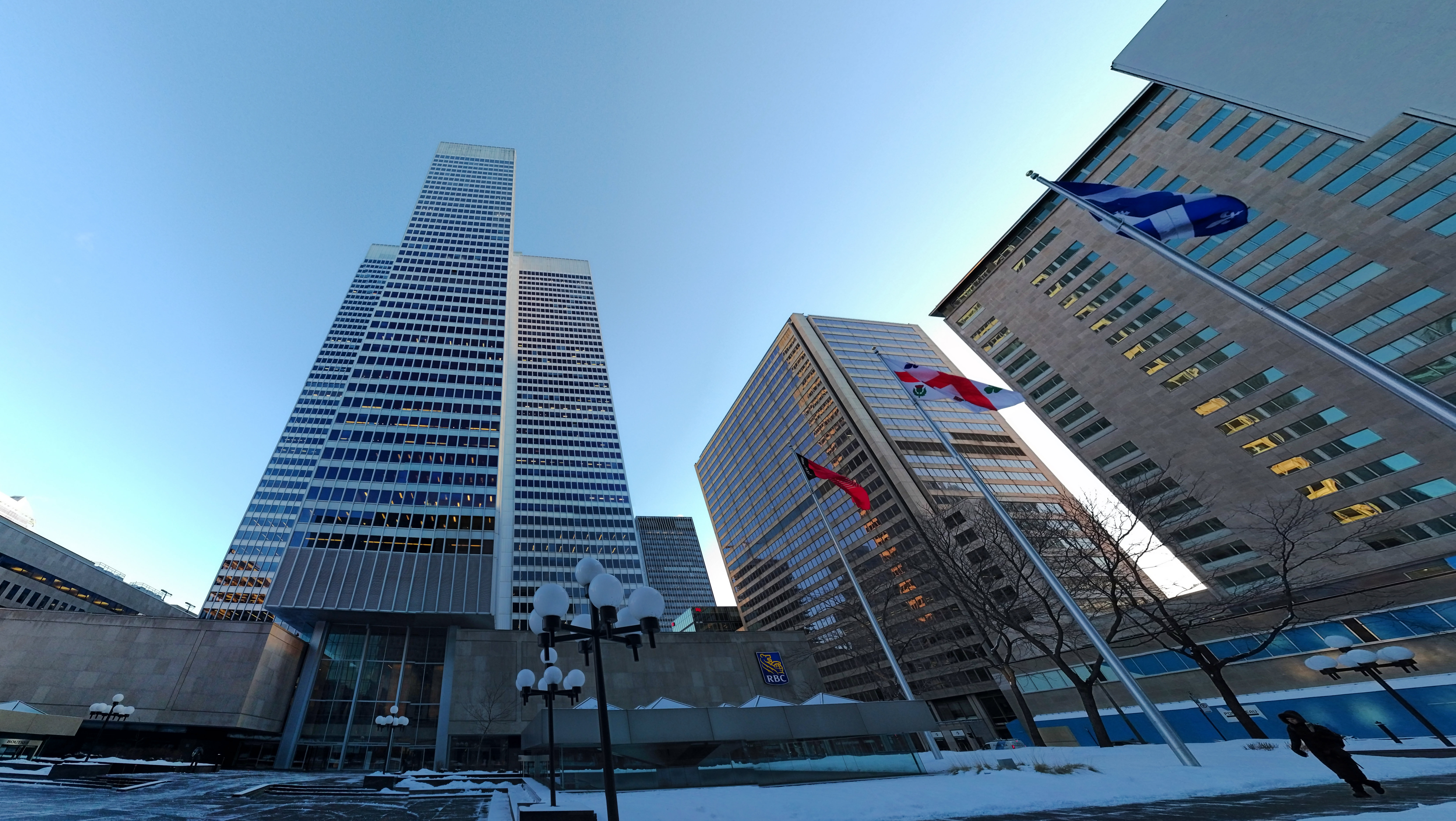 Place Ville-Marie, Montréal.